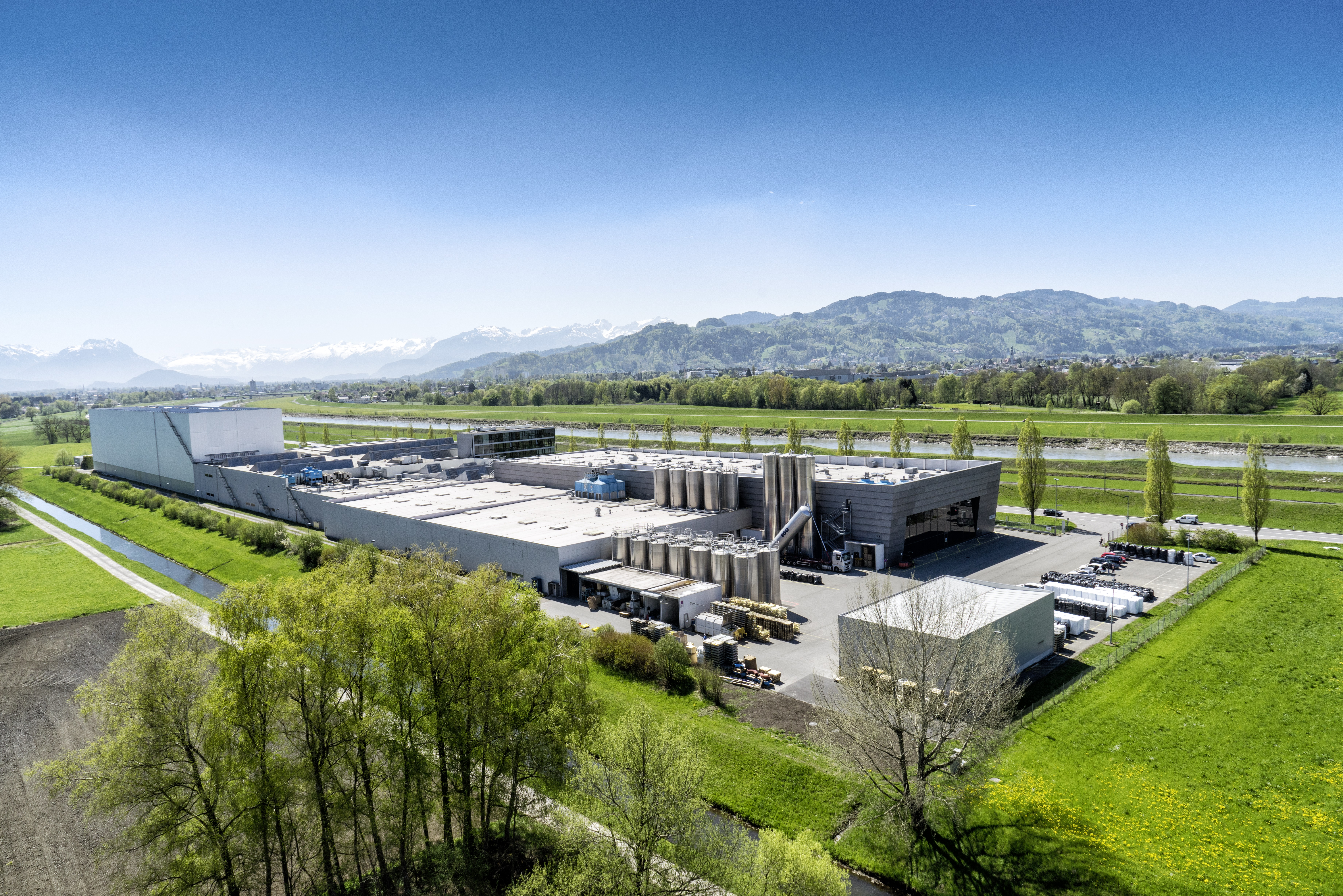 Plant Fussach